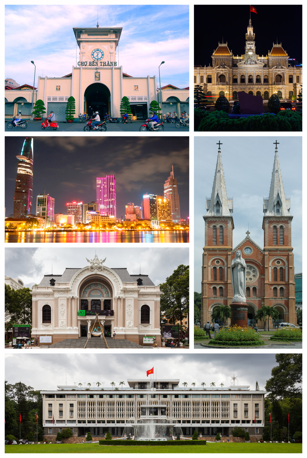 A collage of photos depicting several Ho Chi Minh City buildings and sceneries.